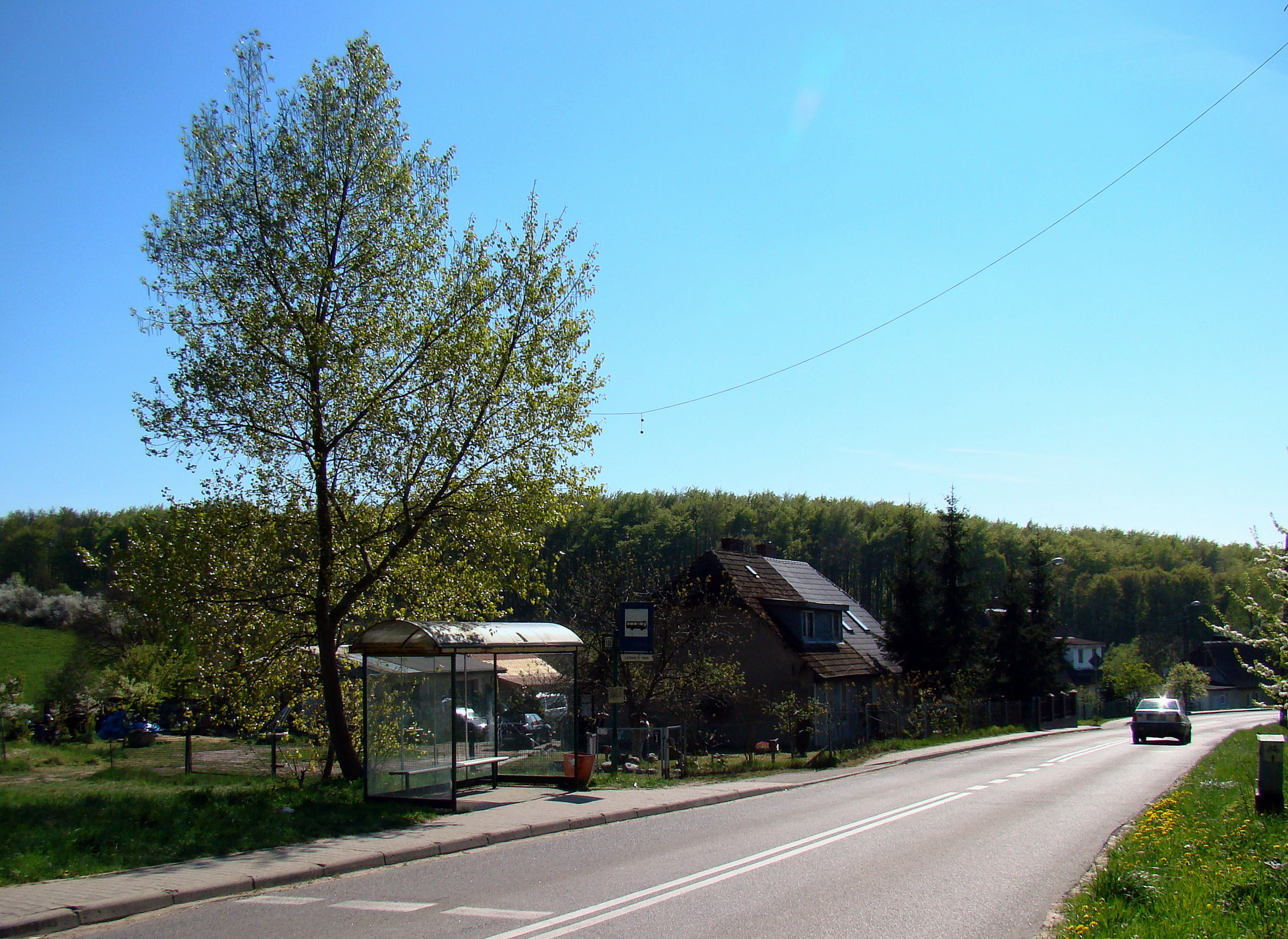 Leśno Górne, (Gmina Police, Powiat policki, Województwo zachodniopomorskie), Polska